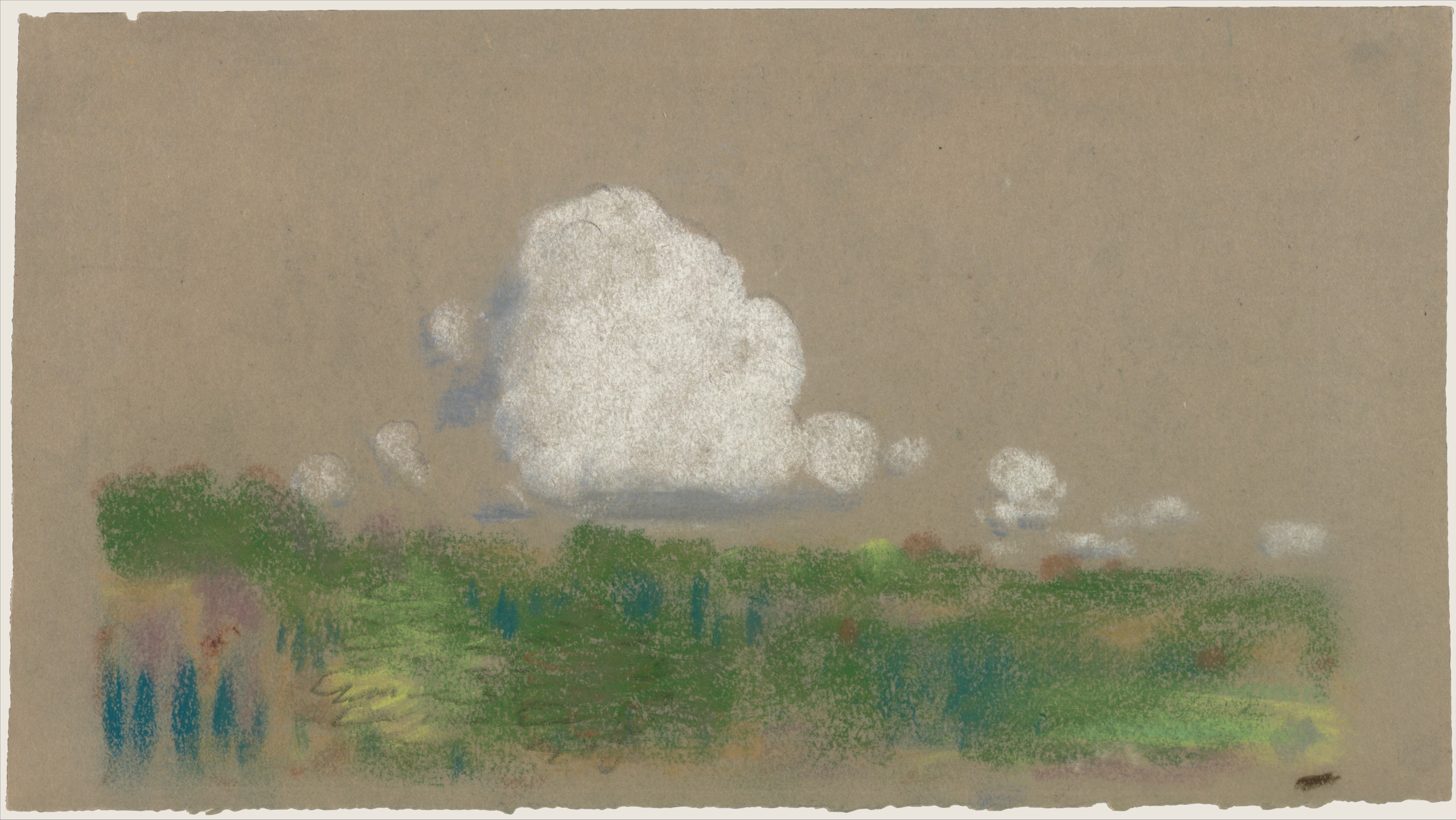 Drawing; Drawings